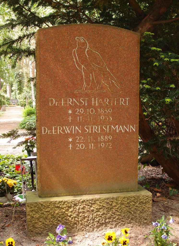 Grab des Ornithologen Ernst Hartert (1859-1933) auf dem Waldfriedhof Dahlem in Berlin